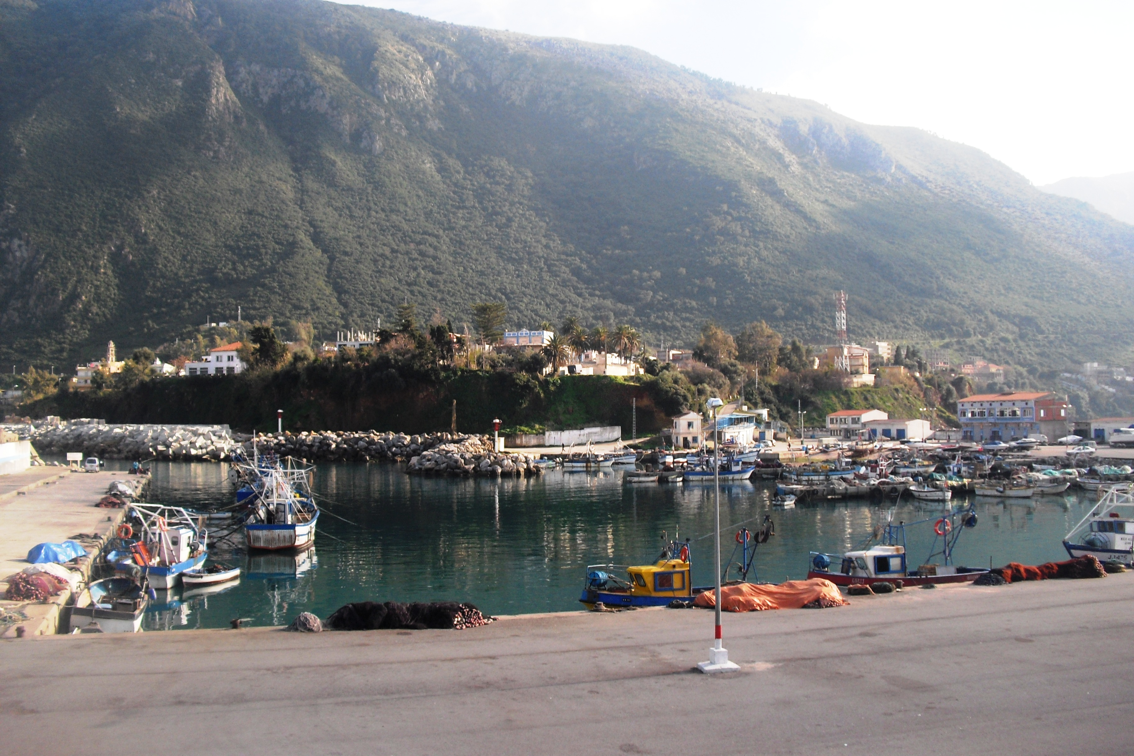 Vue sur le village de Mansouria et son port de pèche, Commune de Ziama Mansouria (Jijel - Algérie) photo prise par mon appareil en avril 2011